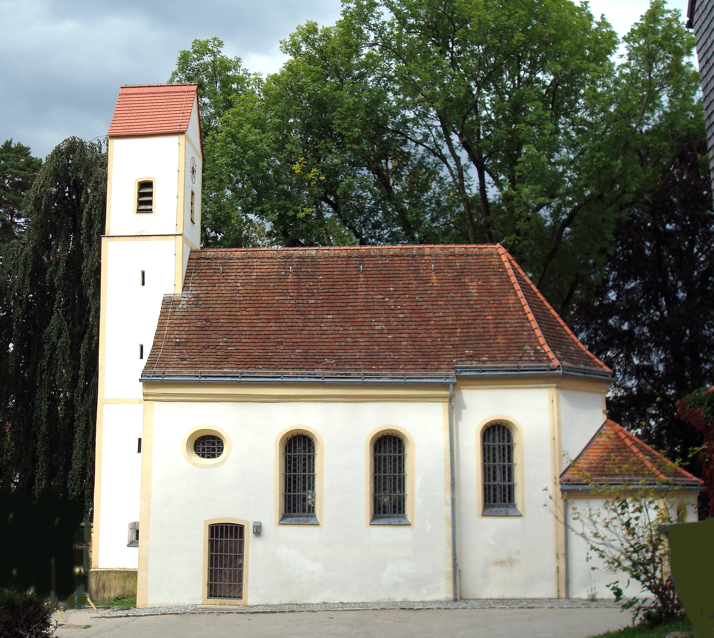 Berg am Starnberger See, OT Kempfenhausen. In enger Verbindung zum Schloss Kempfenhausen steht die 1719 geweihte und 1755 umgebaute Kapelle St. Anna. Ihr Kern geht auf eine sehr viel frühere Zeit zurück, denn in der Freisinger Matrikel von 1524 ist sie bereits aufgeführt. This is a photograph of an architectural monument.